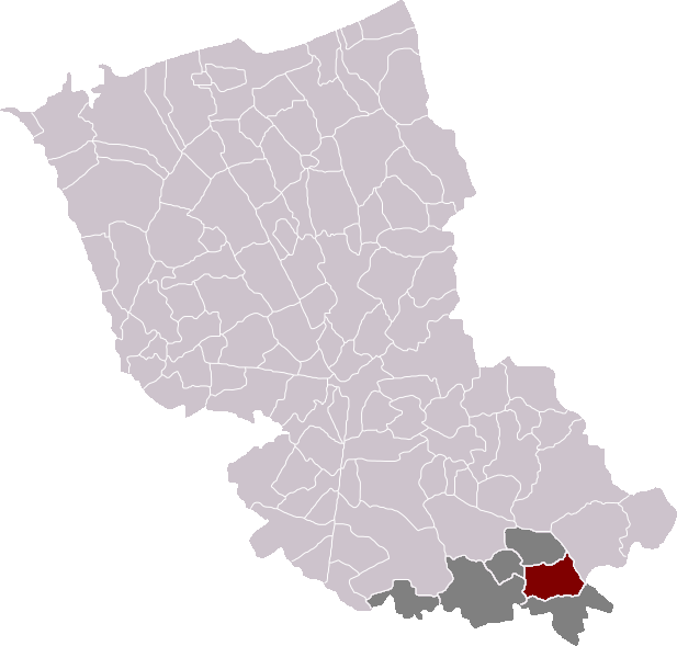 Locatie gemeente Stegers in arrondissement Duinkerke. Zelfgemaakt. Location of Estaires municipality in the arrondissement of Dunkirk. Self made. Localisation de la commune d'Estaires dans l'arrondissement de Dunkerque. Fait moi-même.